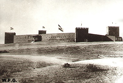 Alte Feste Windhoek kurz nach der Fertigstellung im Jahre 1891